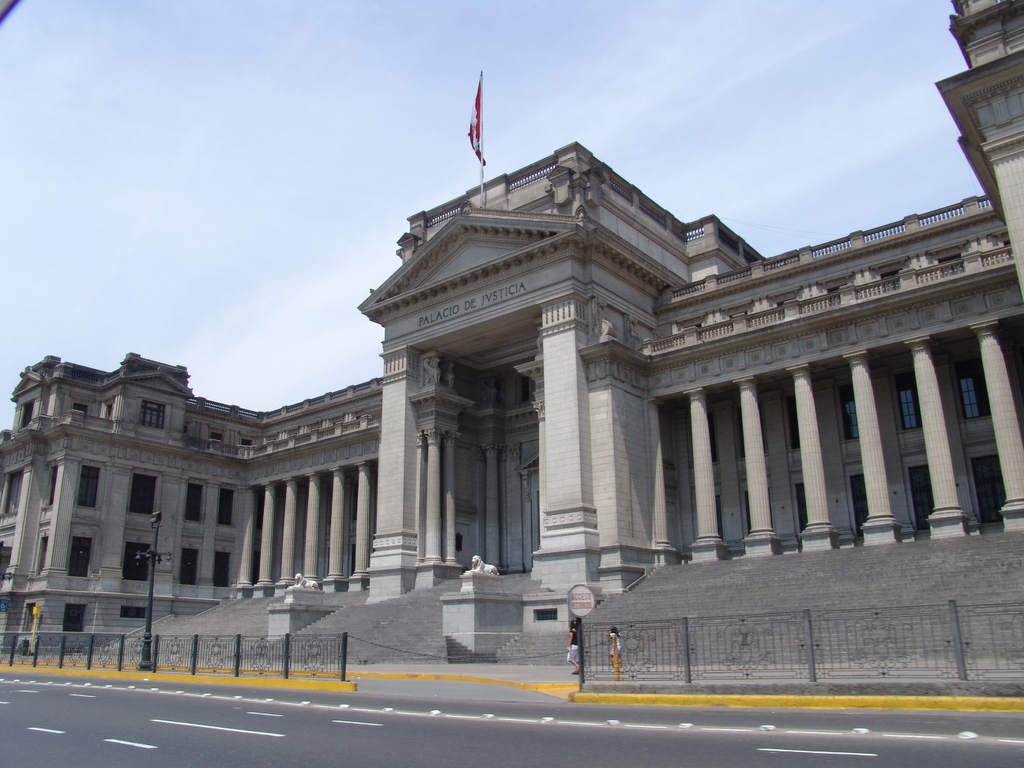 Fotografía de la explanada del Palacio de Justicia del Perú